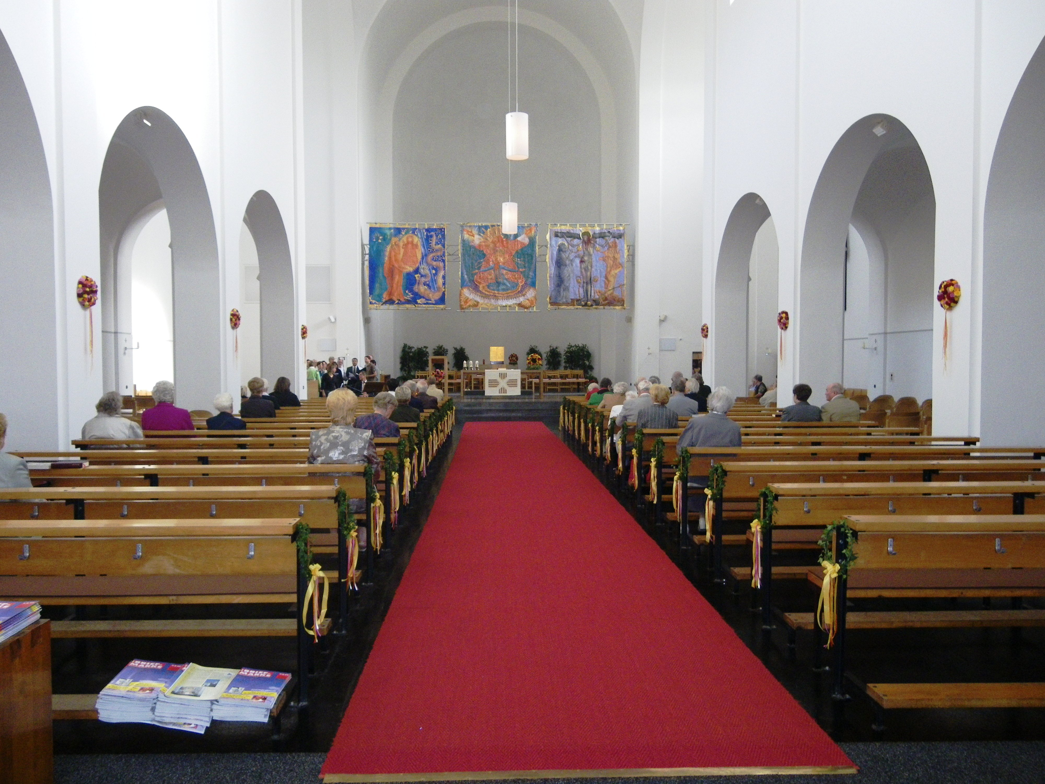 Innenraum der Hetzendorfer Pfarrkirche kurz vor Beginn des feierlichen Gottesdienstes zum 150-Jahr-Jubiläum der Kirche.